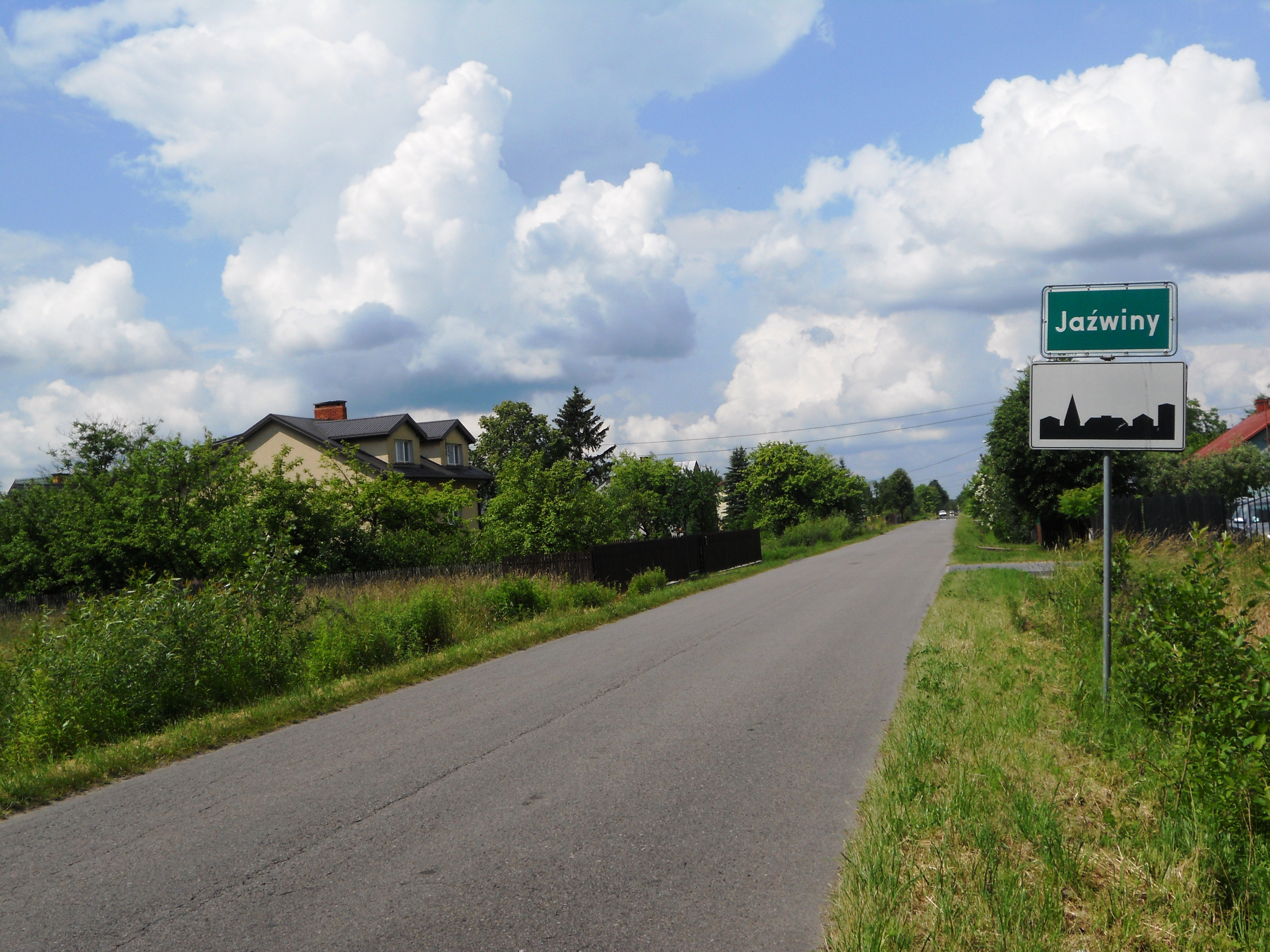 Miejscowość w gminie Pilawa